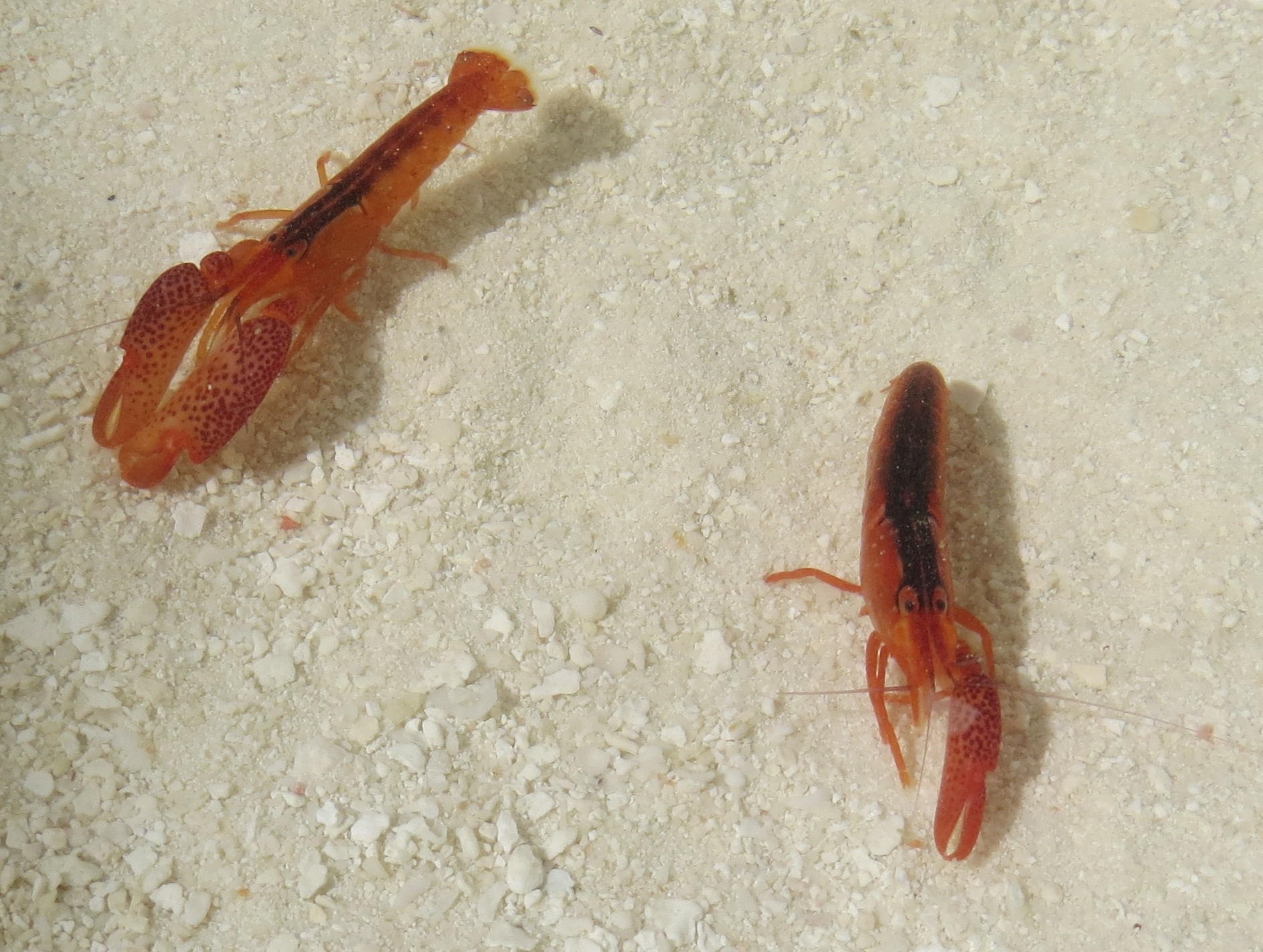 Un couple de crevettes Alpheus lottini trouvé dans un massif de corail Pocillopora aux Maldives (Landaagiraavaru, atoll de Baa).